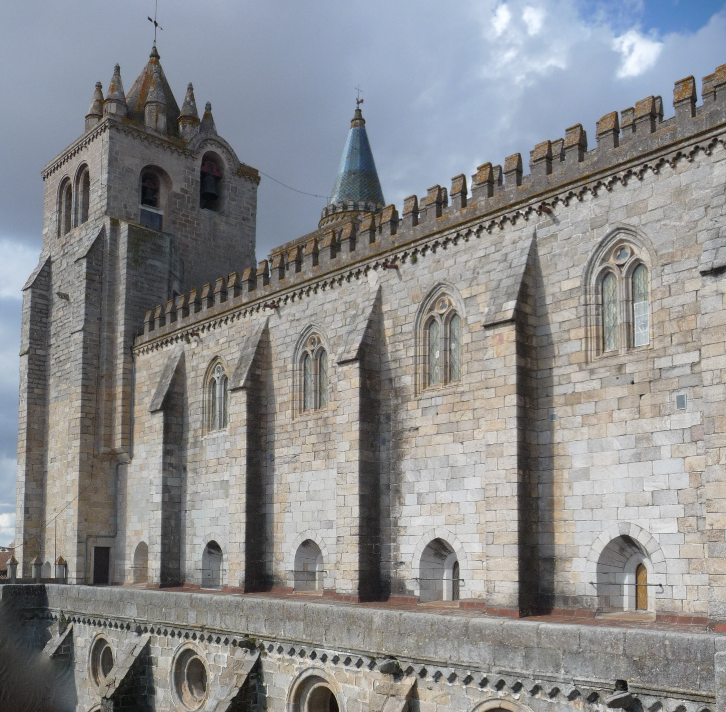 Katedra.